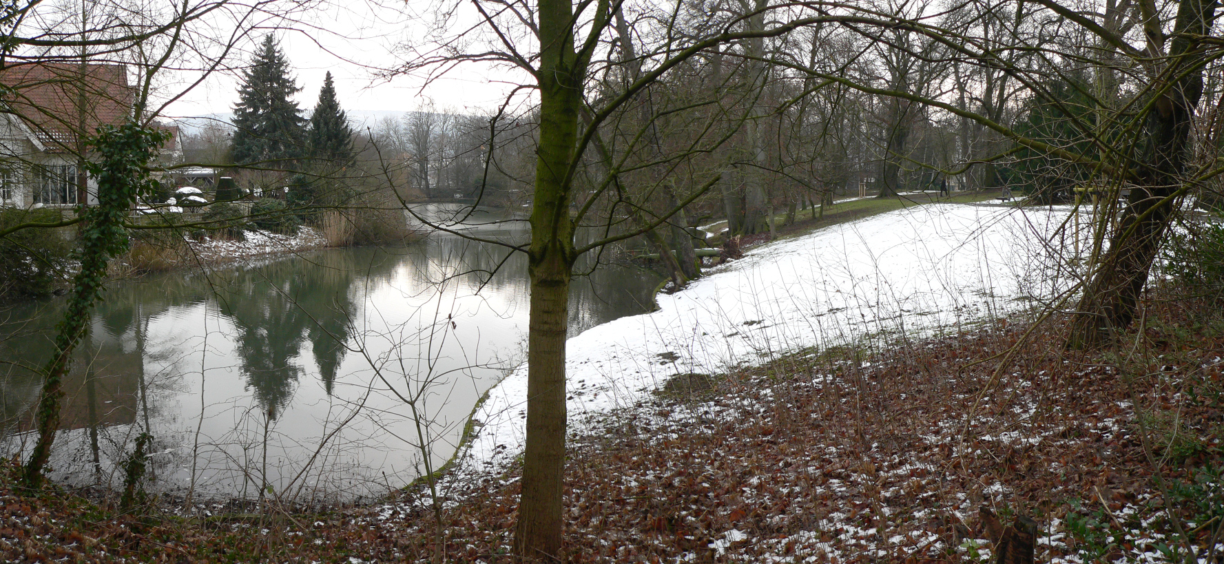 Graft und Wall der Stadtbefestigung Rinteln